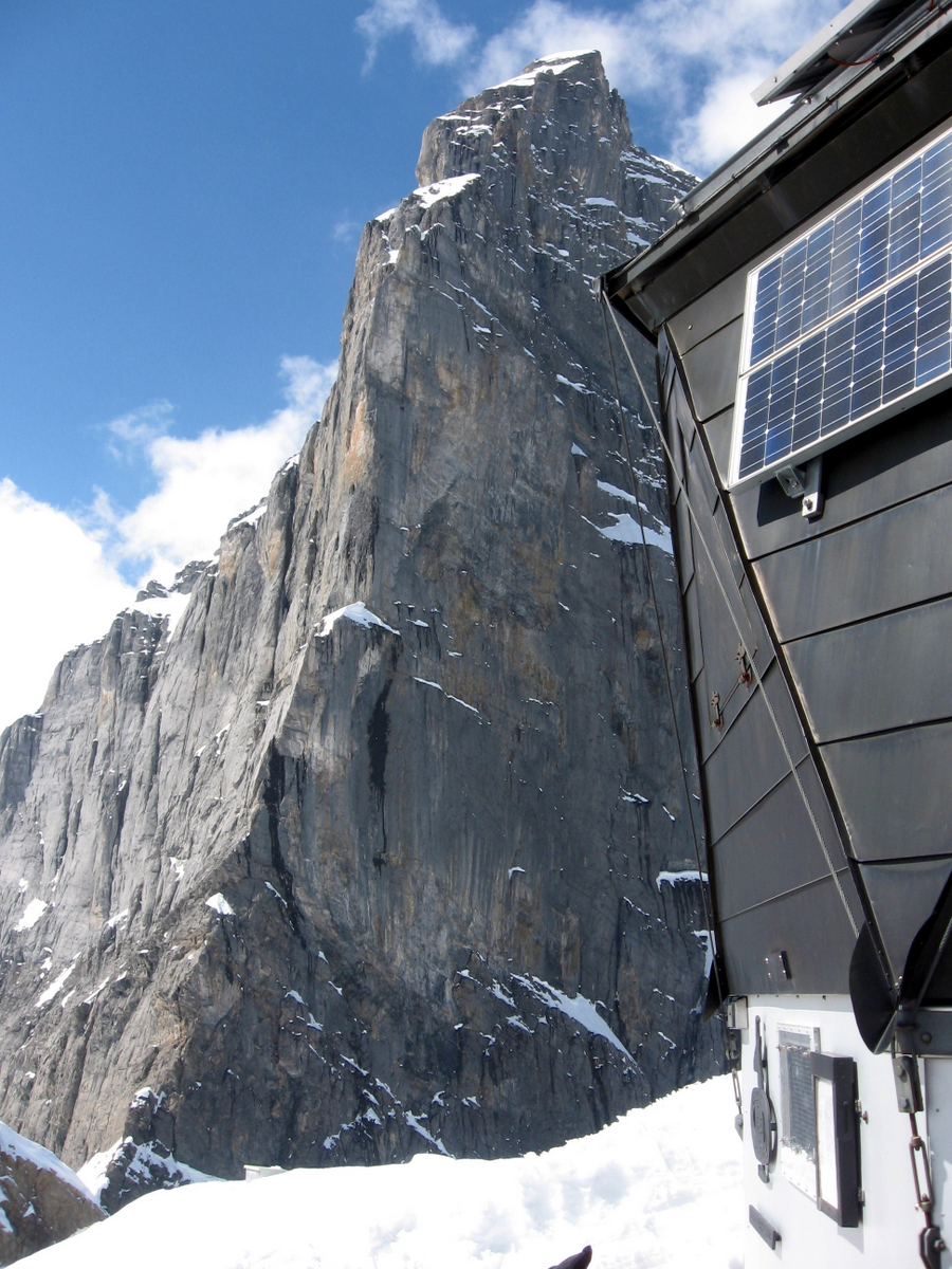 Titlis, Switzerland